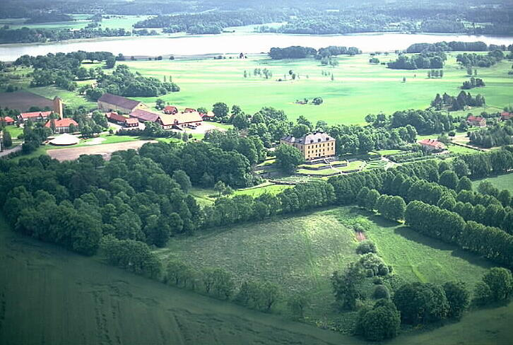 Motiv: Venngarn Nyckelord: Byggnadsminnen, Flygbilder, Riksintressen Kategori: Herrgårds-/slottslandskapVenngarn